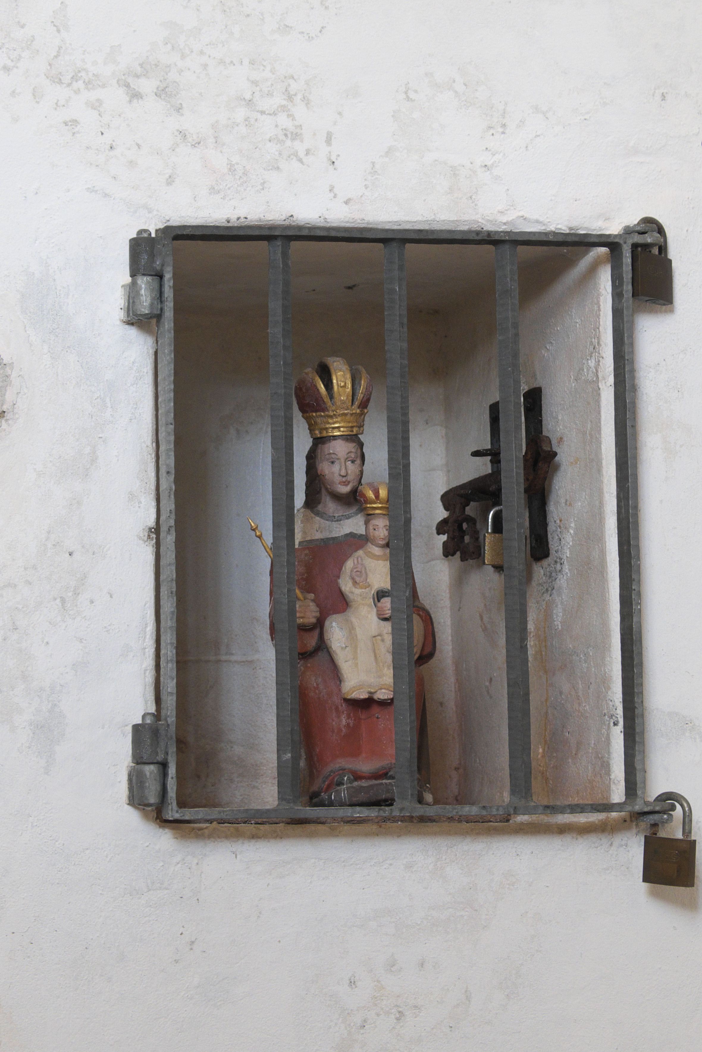 Katholische Filialkirche Unsere Liebe Frau in Gasseltshausen (Aiglsbach) im niederbayerischen Landkreis Kelheim (Bayern/Deutschland), untere Kapelle, Madonna, Schlüssel vermutlich der unteren Kirchentür